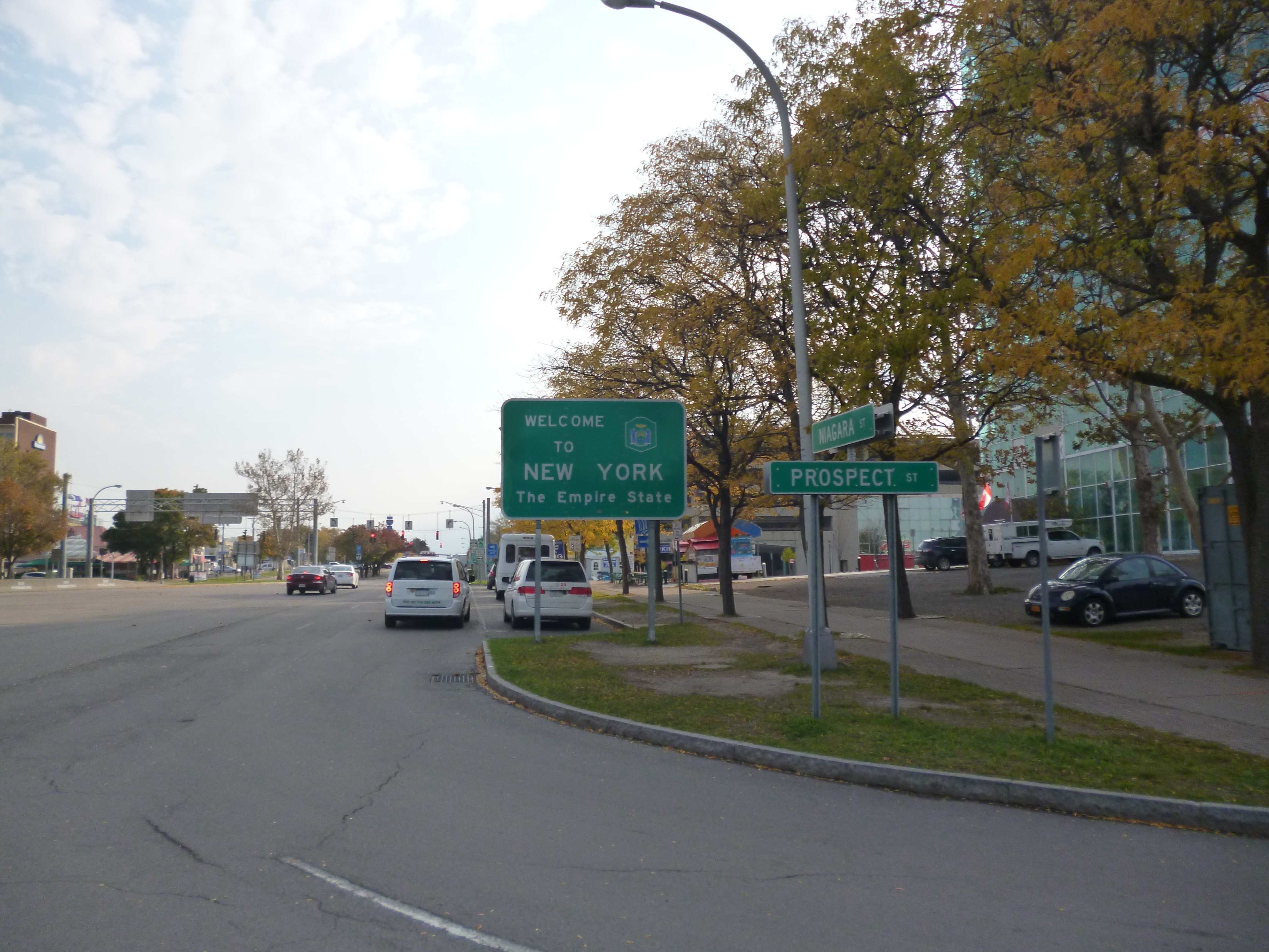 Panneau d'entrée dans l'état de New York (USA), au niveau de la ville de Niagara Falls.